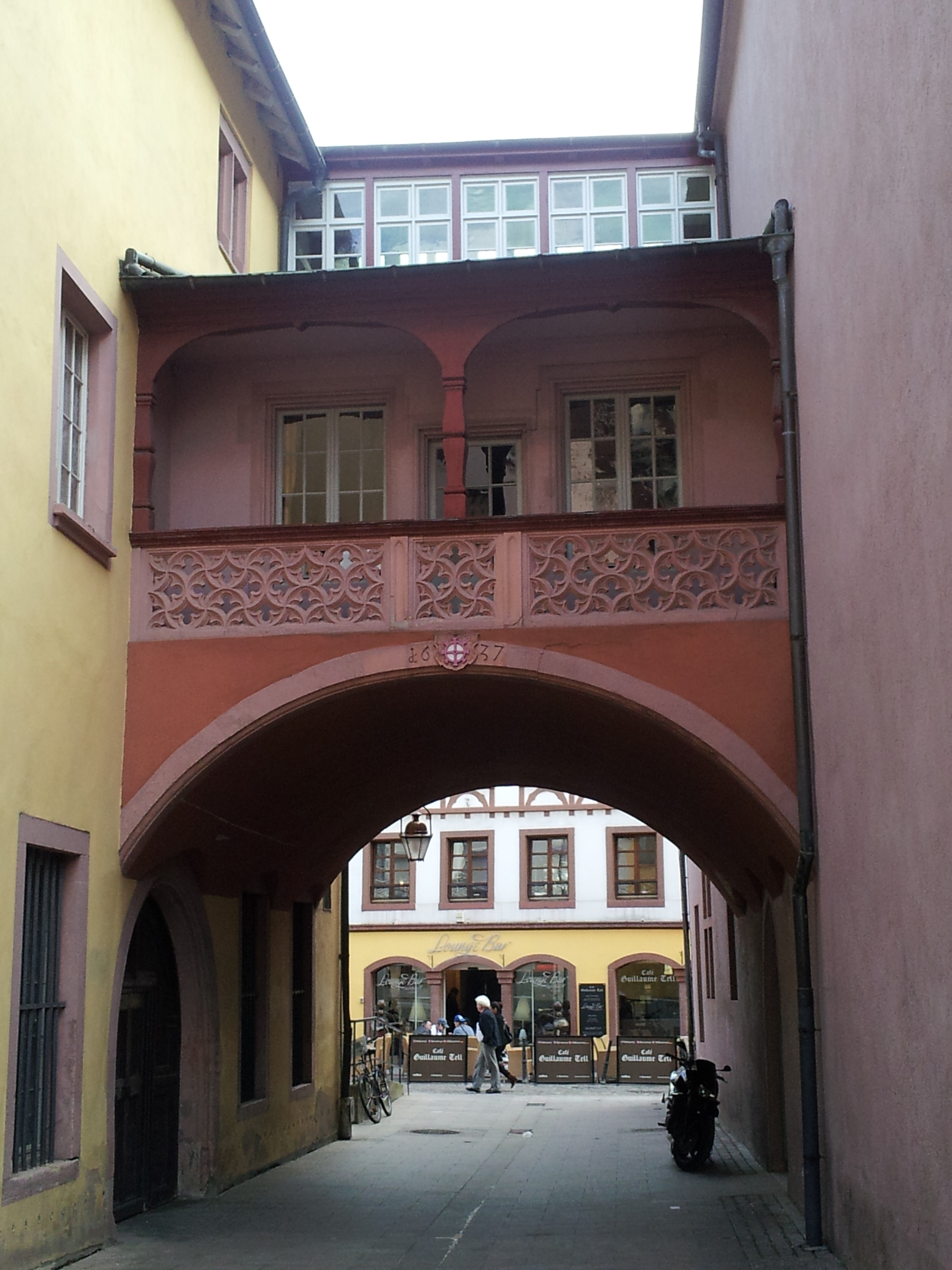 Galerie de 1637 derrière l'Hôtel de ville de Mulhouse